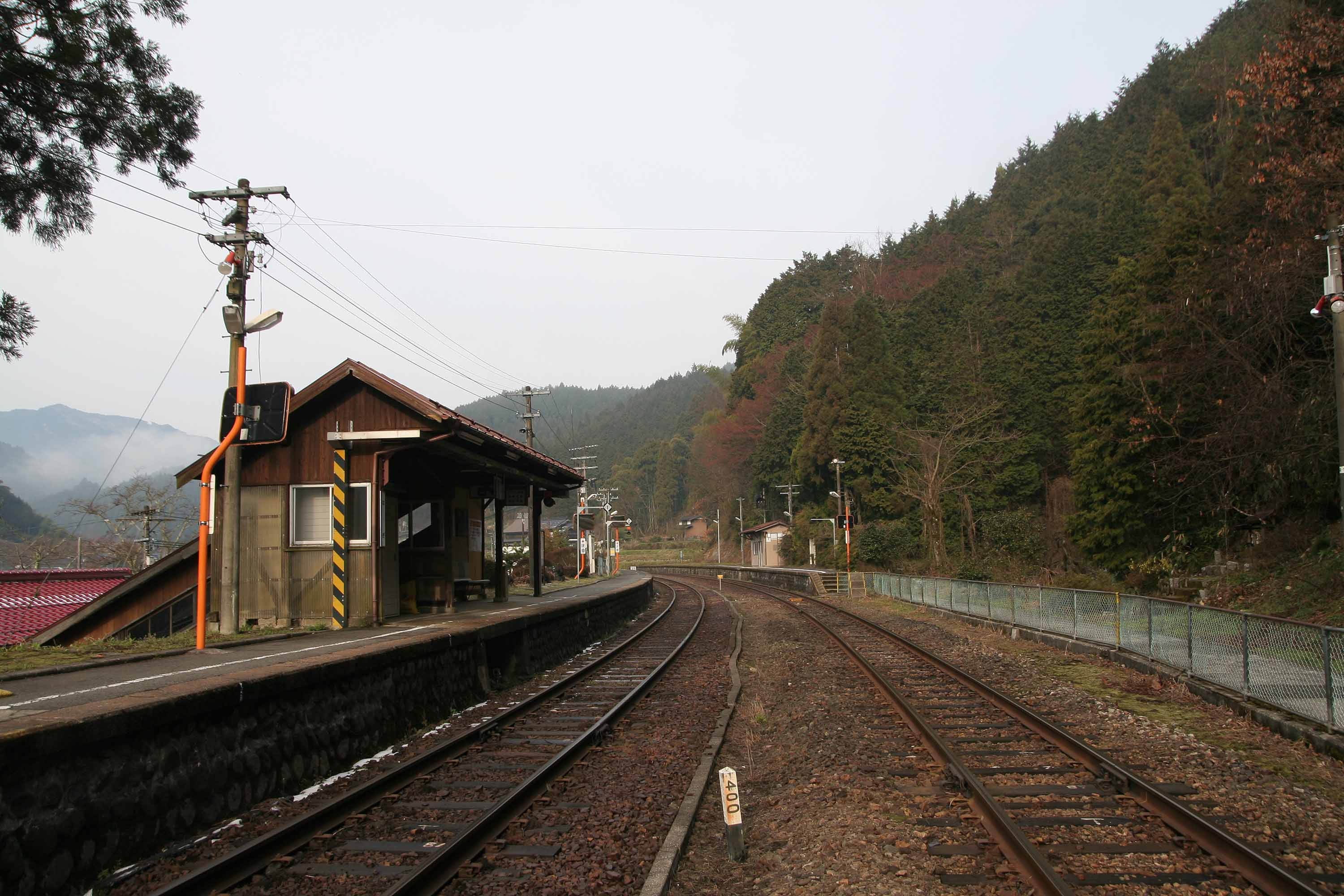 西日本旅客鉄道 那岐駅の構内